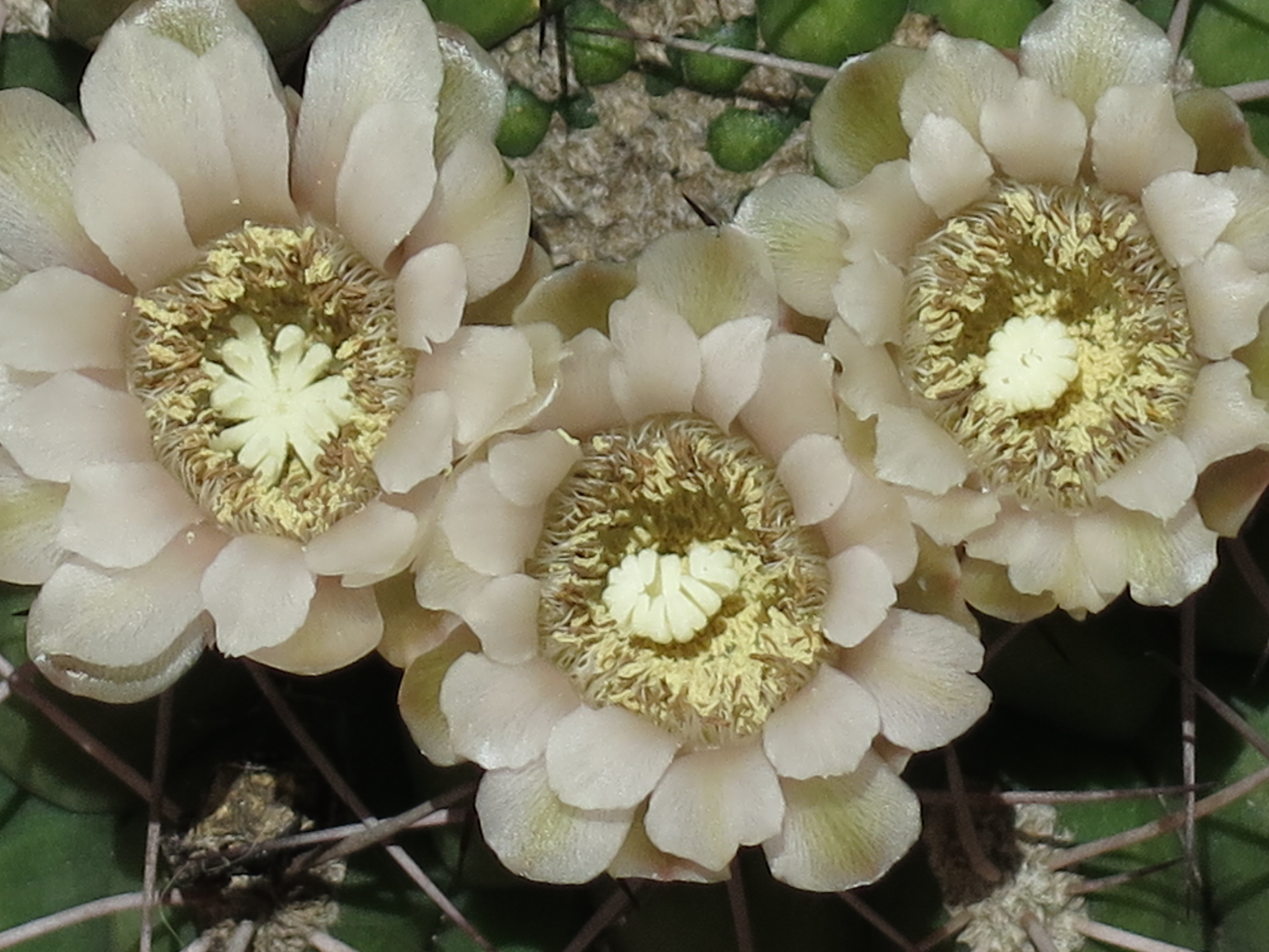 I fiori del gymnocalycium saglionis